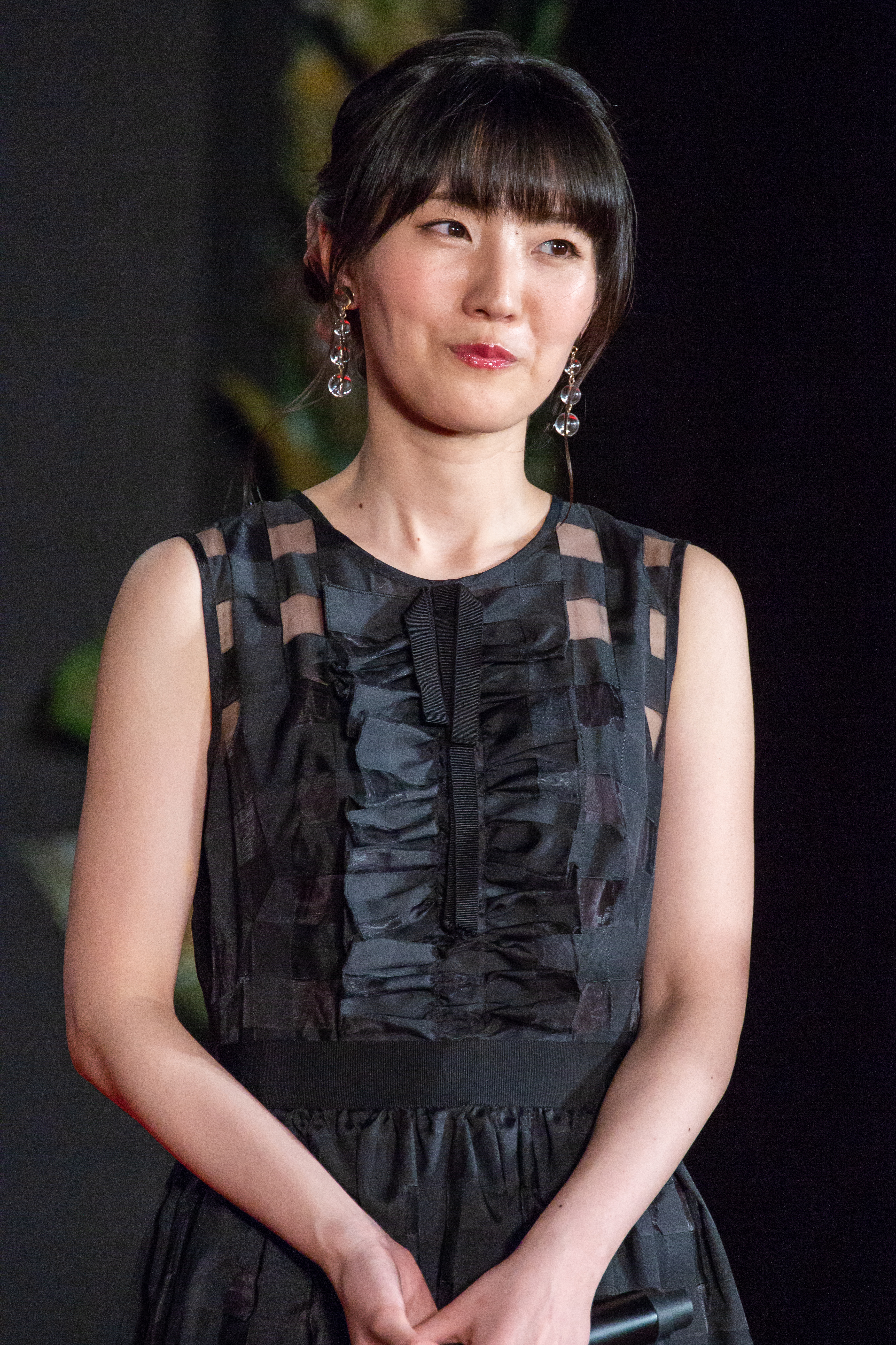 ジュラシック・ワールド/炎の王国 ジャパン・プレミア レッドカーペット 石川由依